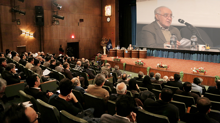 سخنرانی سید حسین صفایی در همایش ملی تجلیل از مقام علمی استاد محمدجعفر جعفری لنگرودی